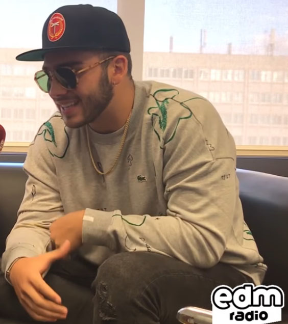 Manuel Turizo entrevista